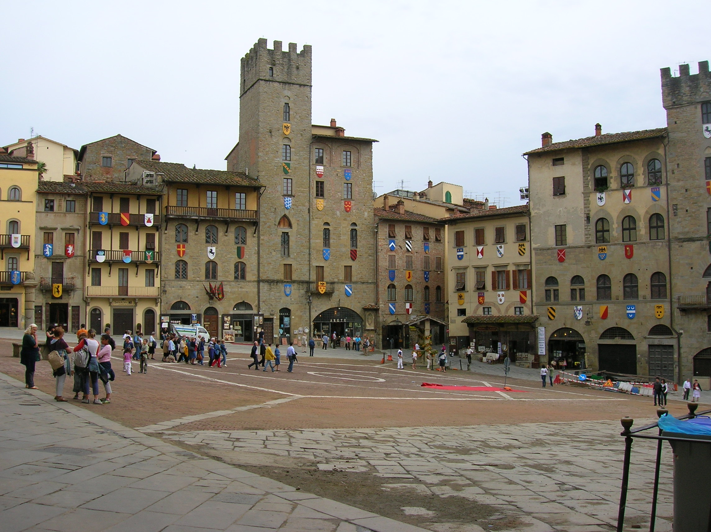 La grande place d'Arezzo avec la maison-tour toscane Lappoli.